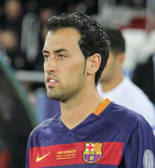 Матч за Суперкубок УЄФА 2015 року у Тбілісі. Грузія